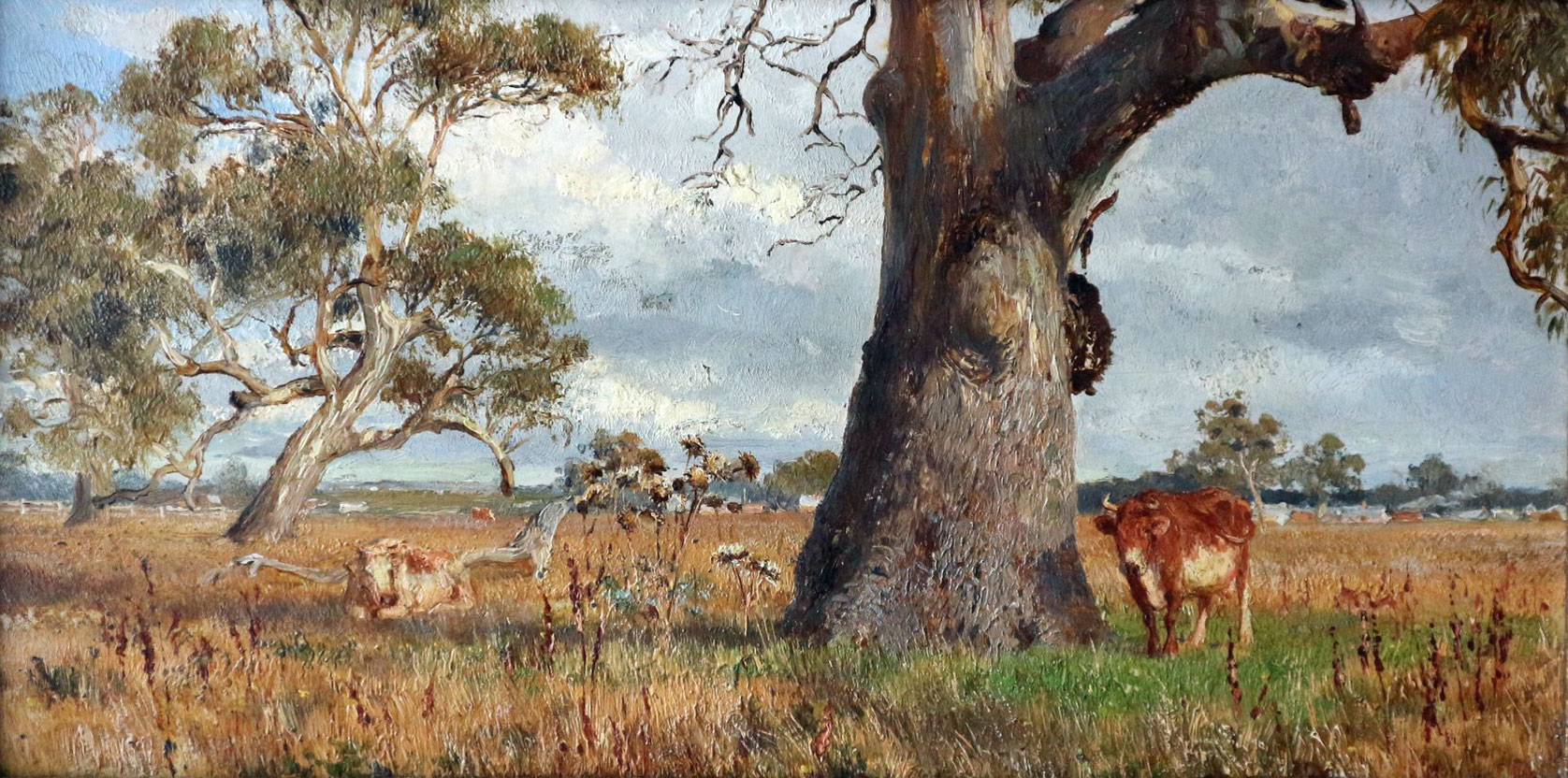 Australische landschap door Jan Hendrik Scheltema